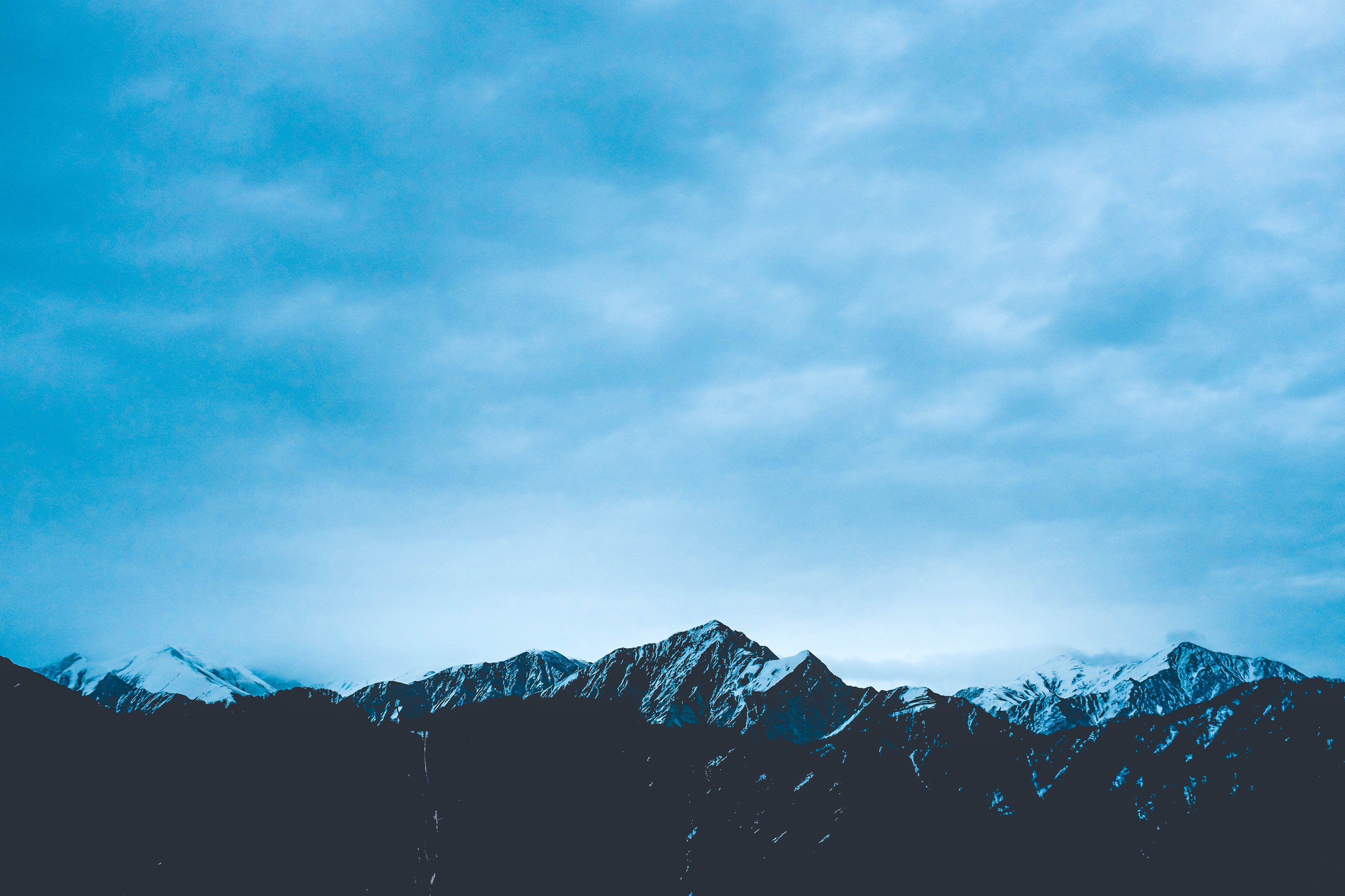 Tufandağ